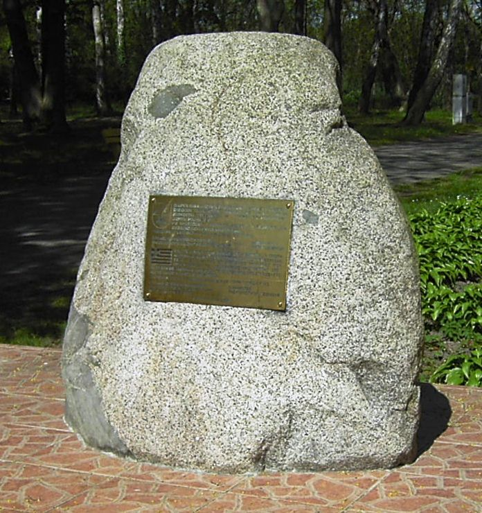 Pomnik w Dziwnowie upamiętniający greckich partyzantów